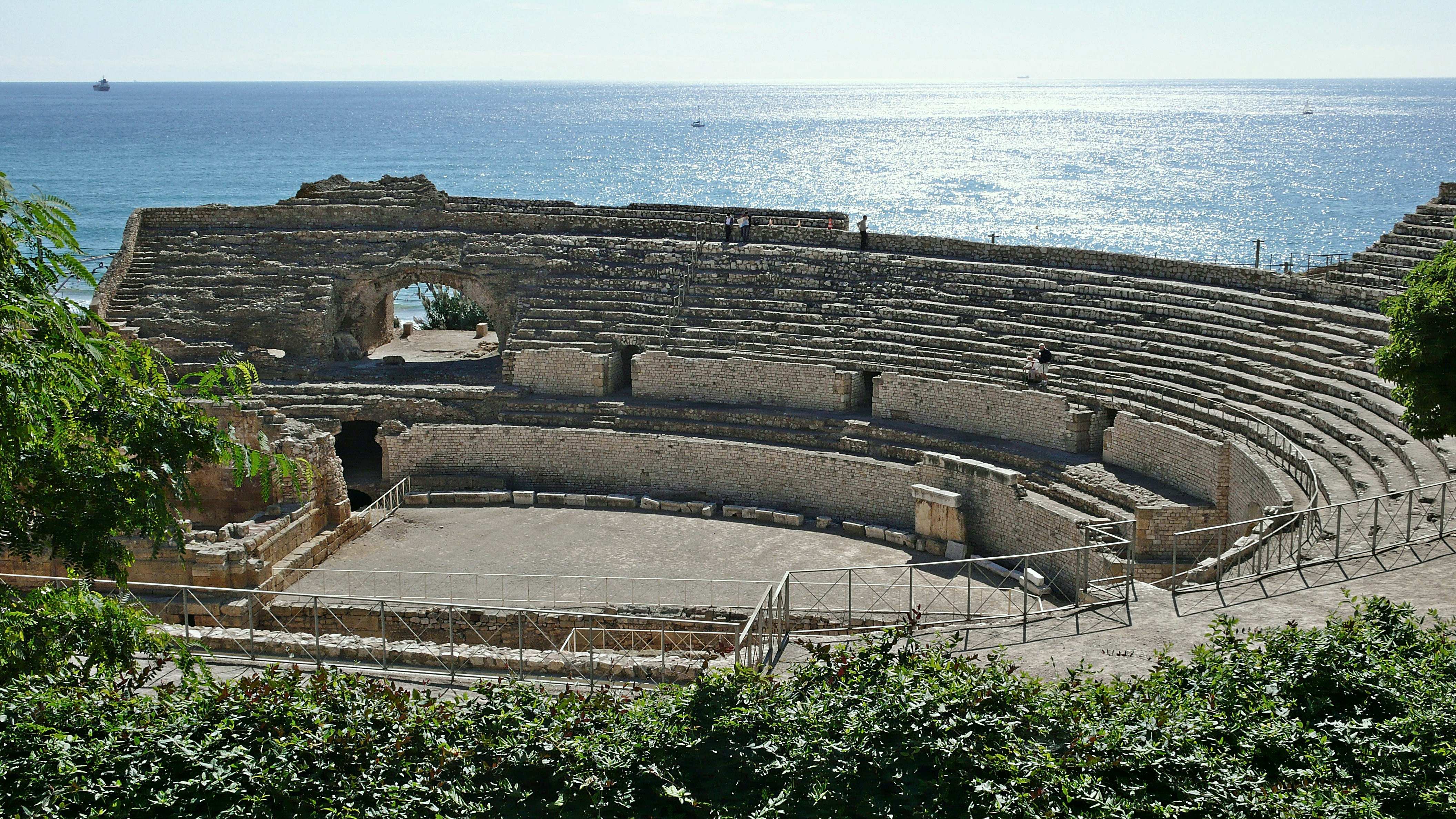 tarragona-cataluña